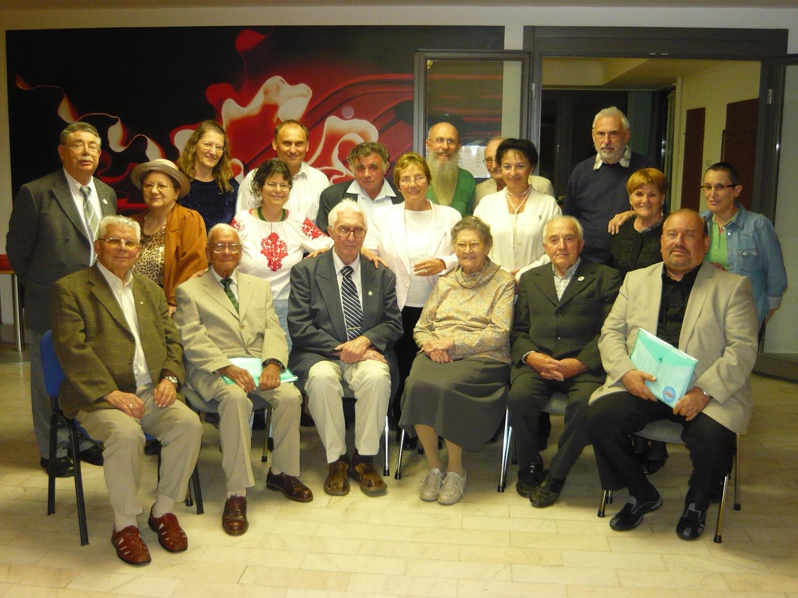 Festantoj.